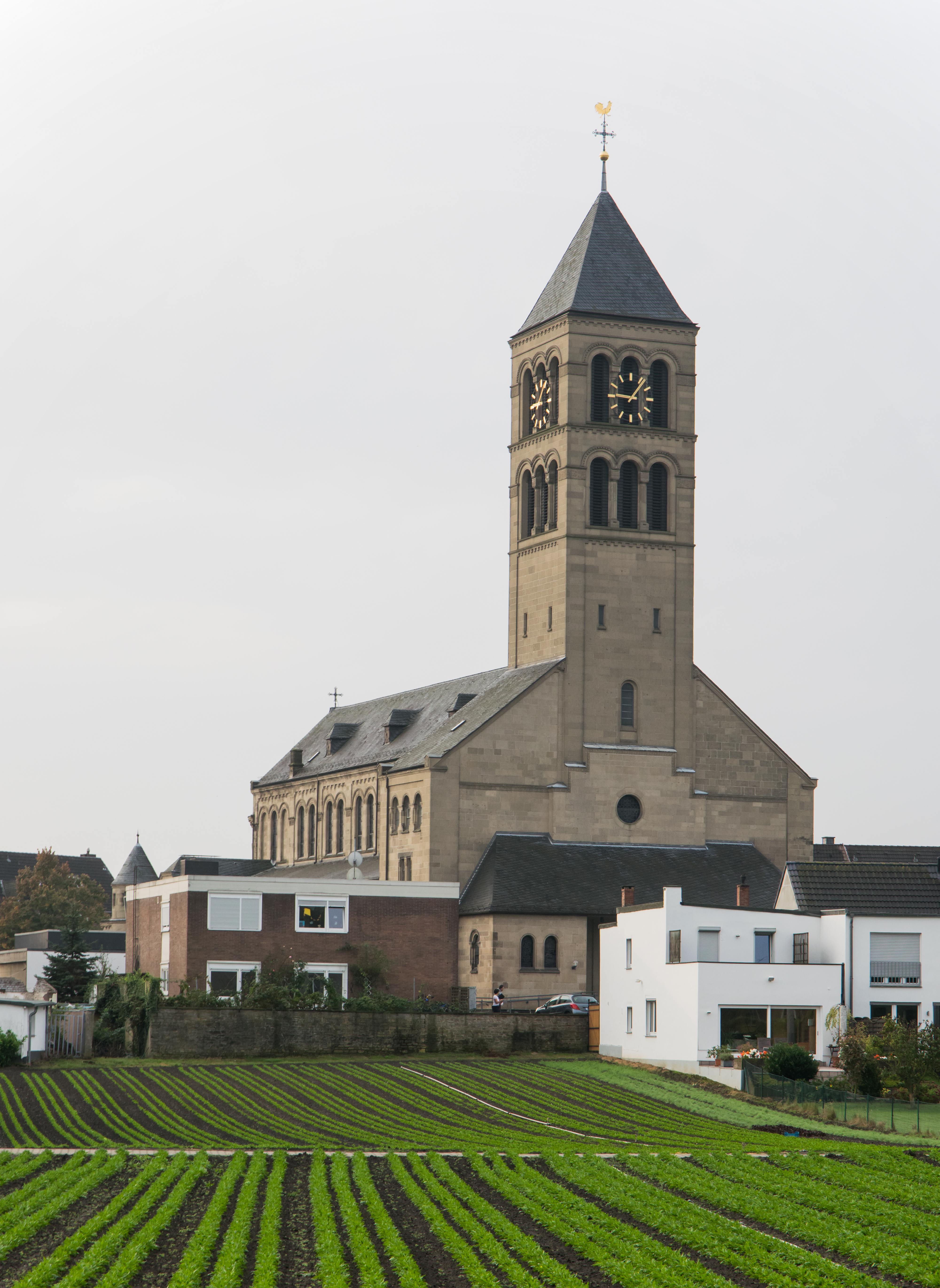 Düsselorf-Hamm St.Blasius